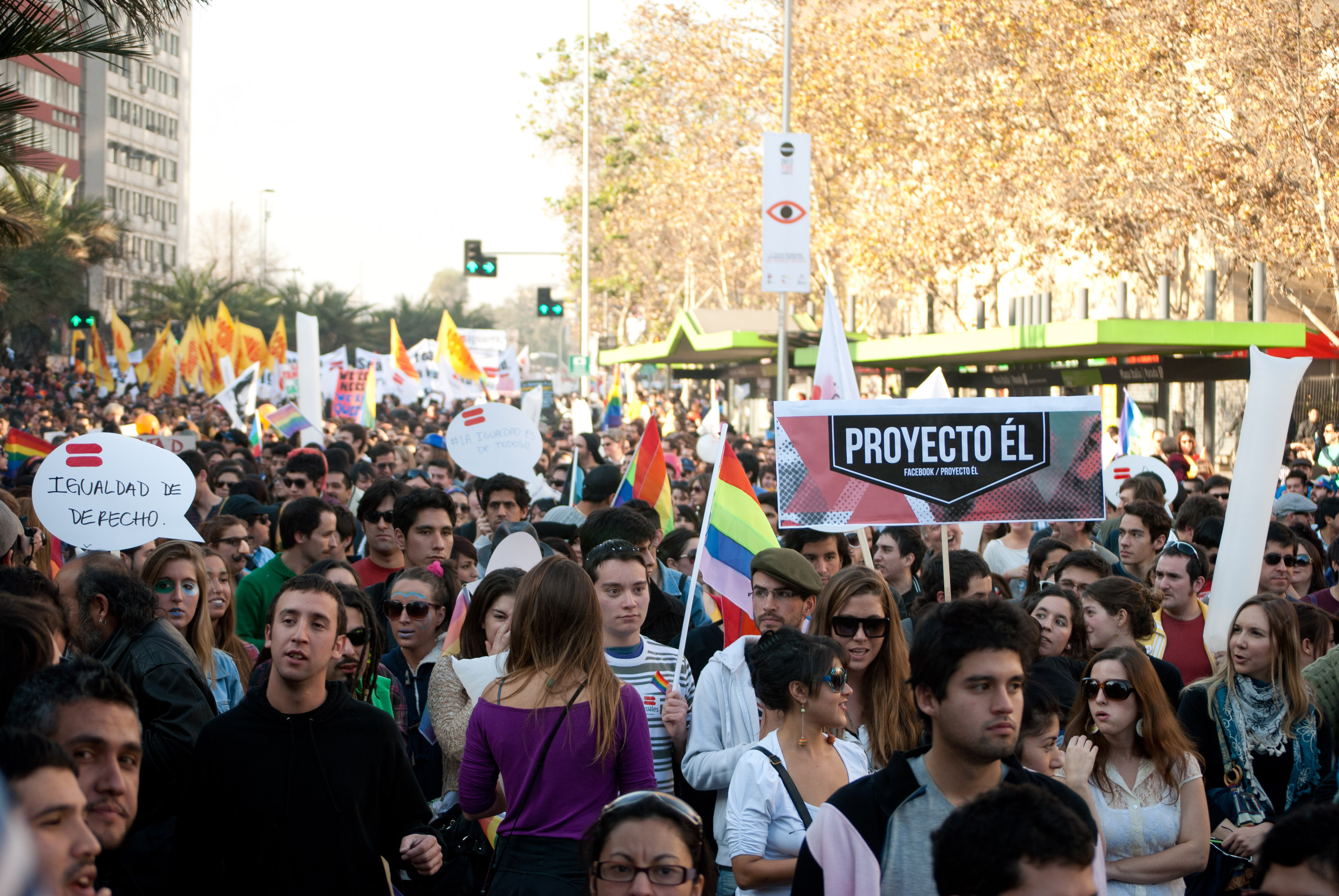 Marcha por la Igualdad o Marcha del Orgullo Gay 2012 en Santiago, Chile.